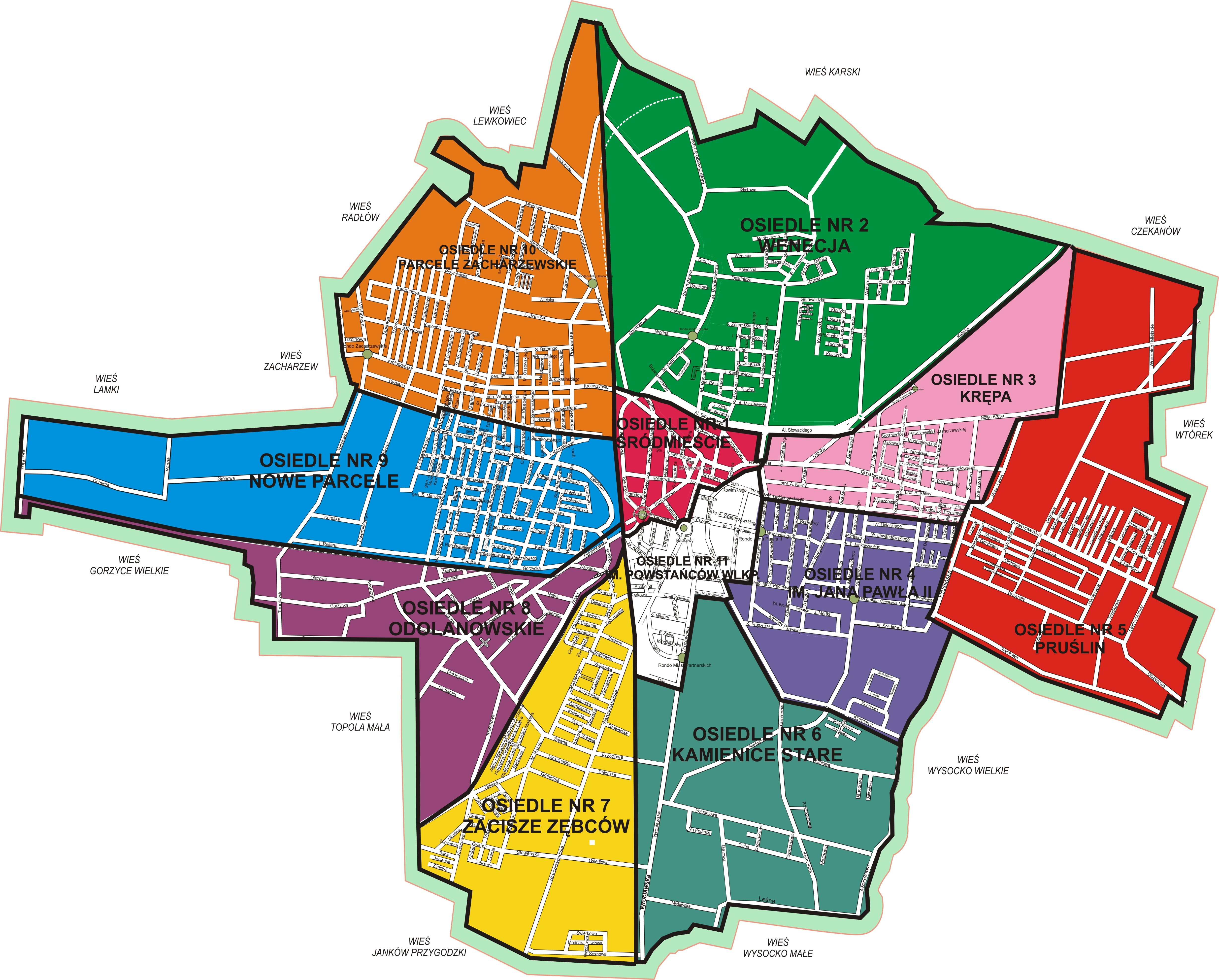 Mapa osiedli miasta Ostrowa Wielkopolskiego.